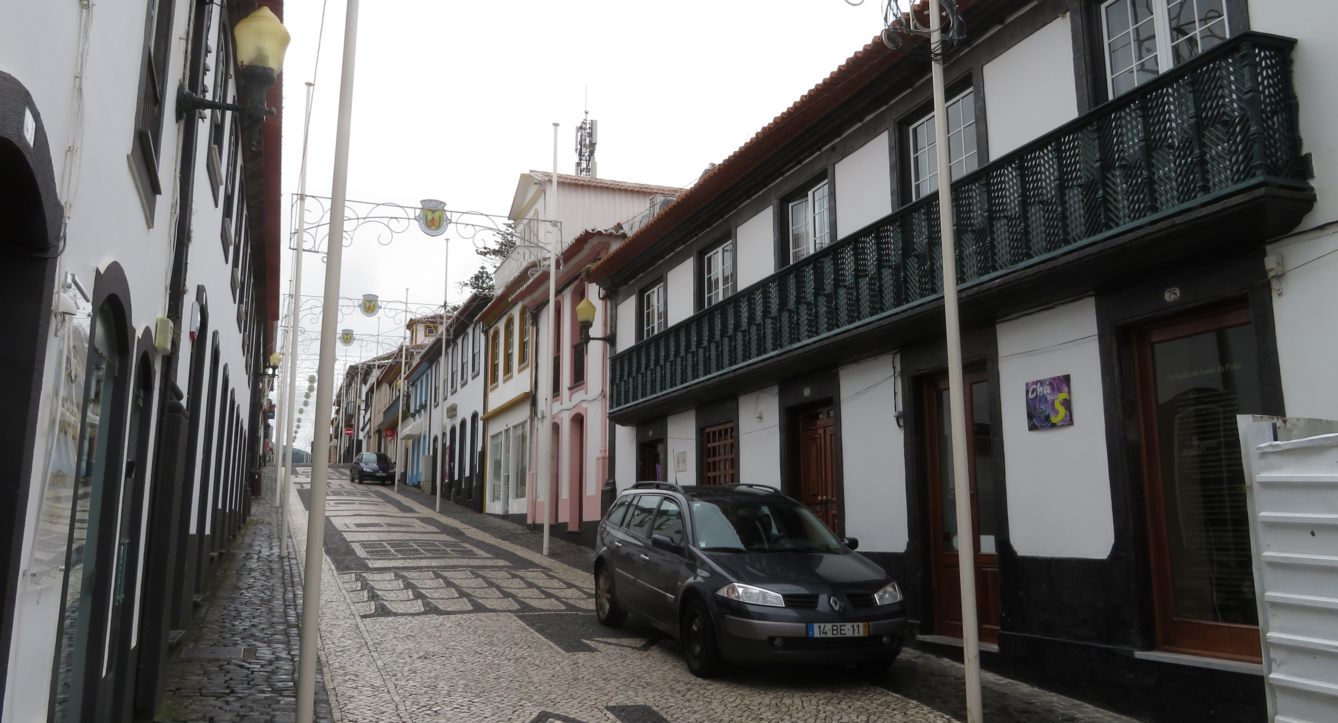 Rua Jesus, die Hauptgeschäftsstraße in Praia da Vitória, Insel Terceira, Azoren, Portugal